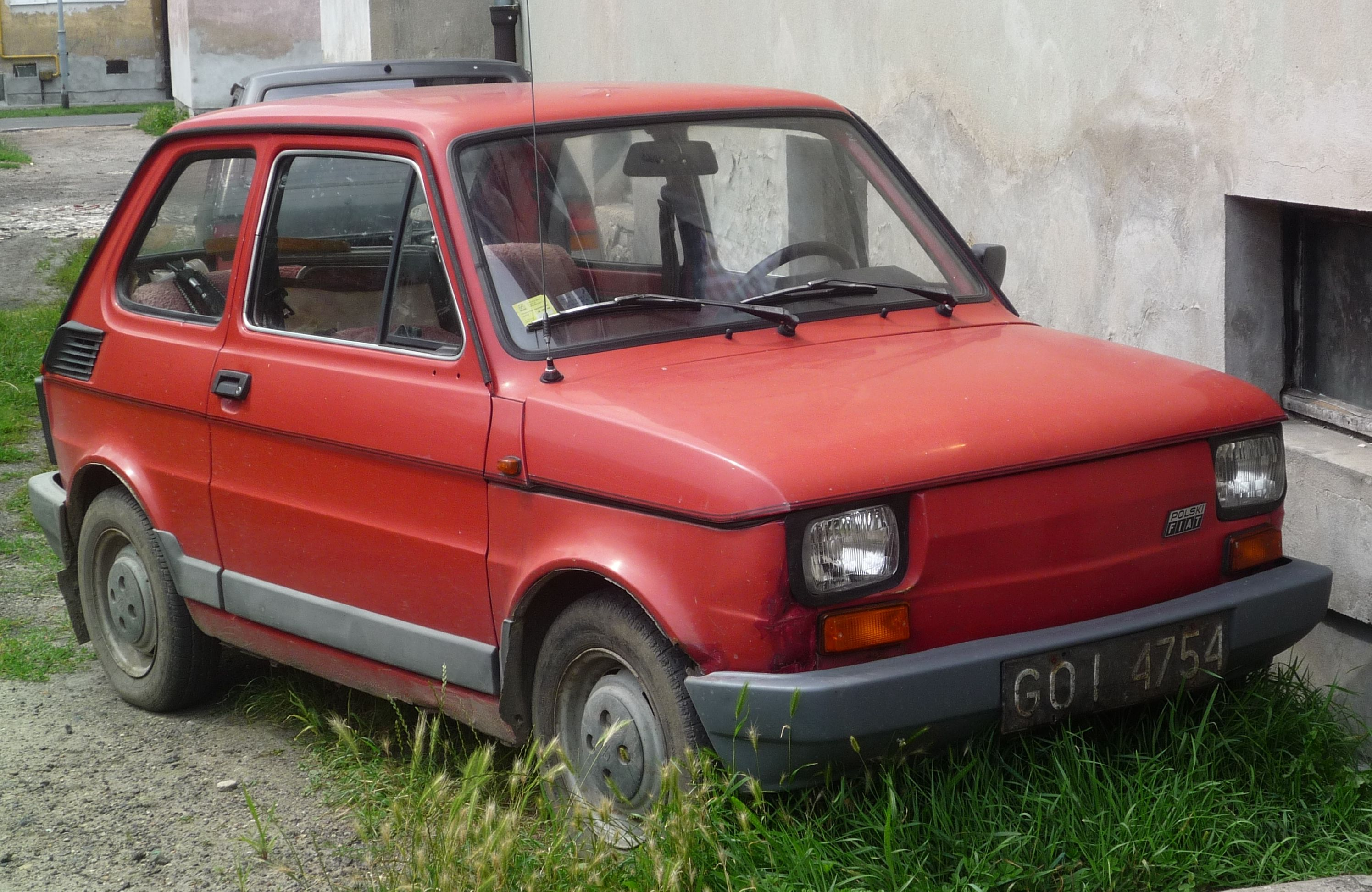 Polski Fiat 126p FL w Słubicach.